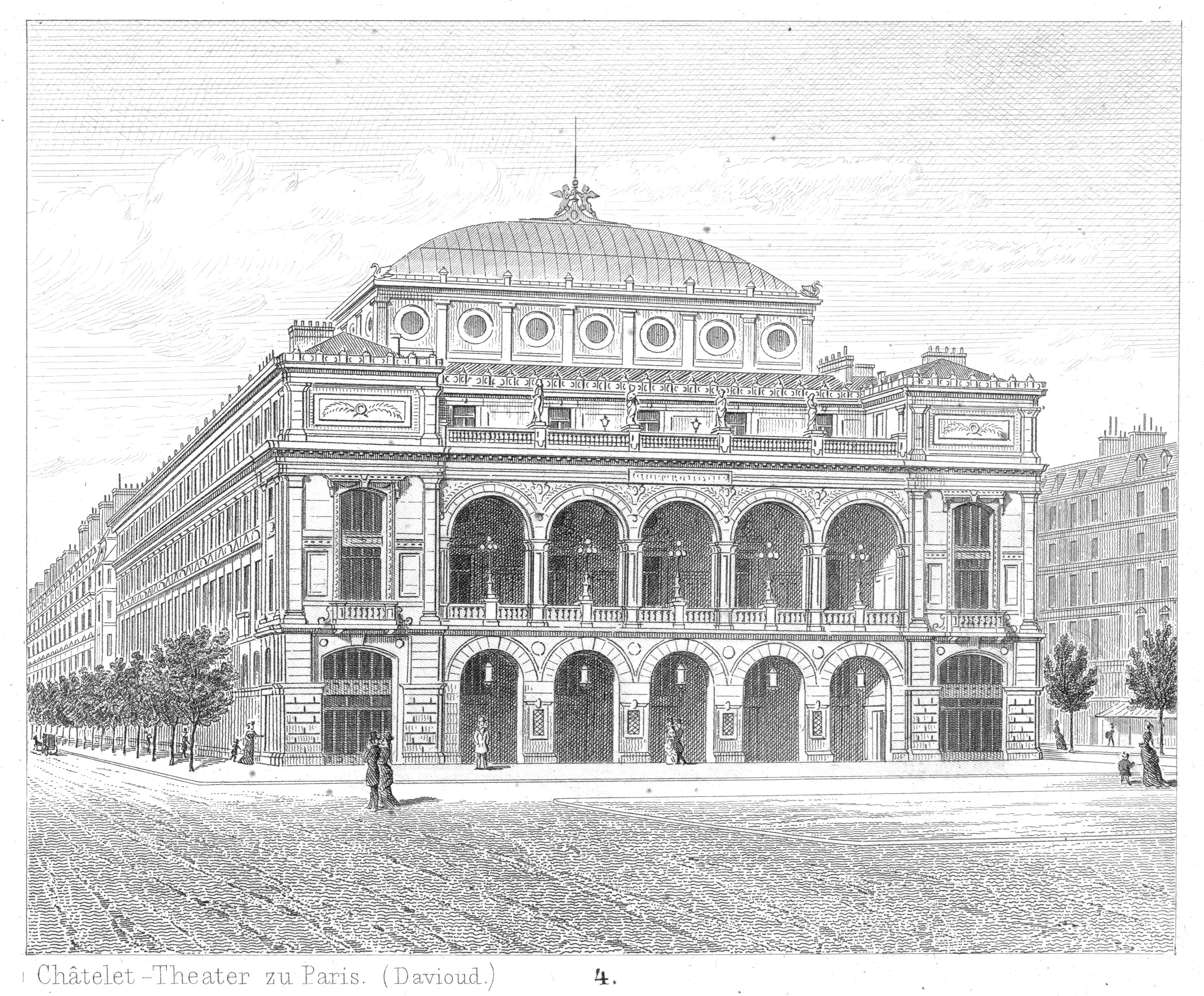 Théâtre du Châtelet, c. 1870-1878, Architekt: Gabriel Davioud